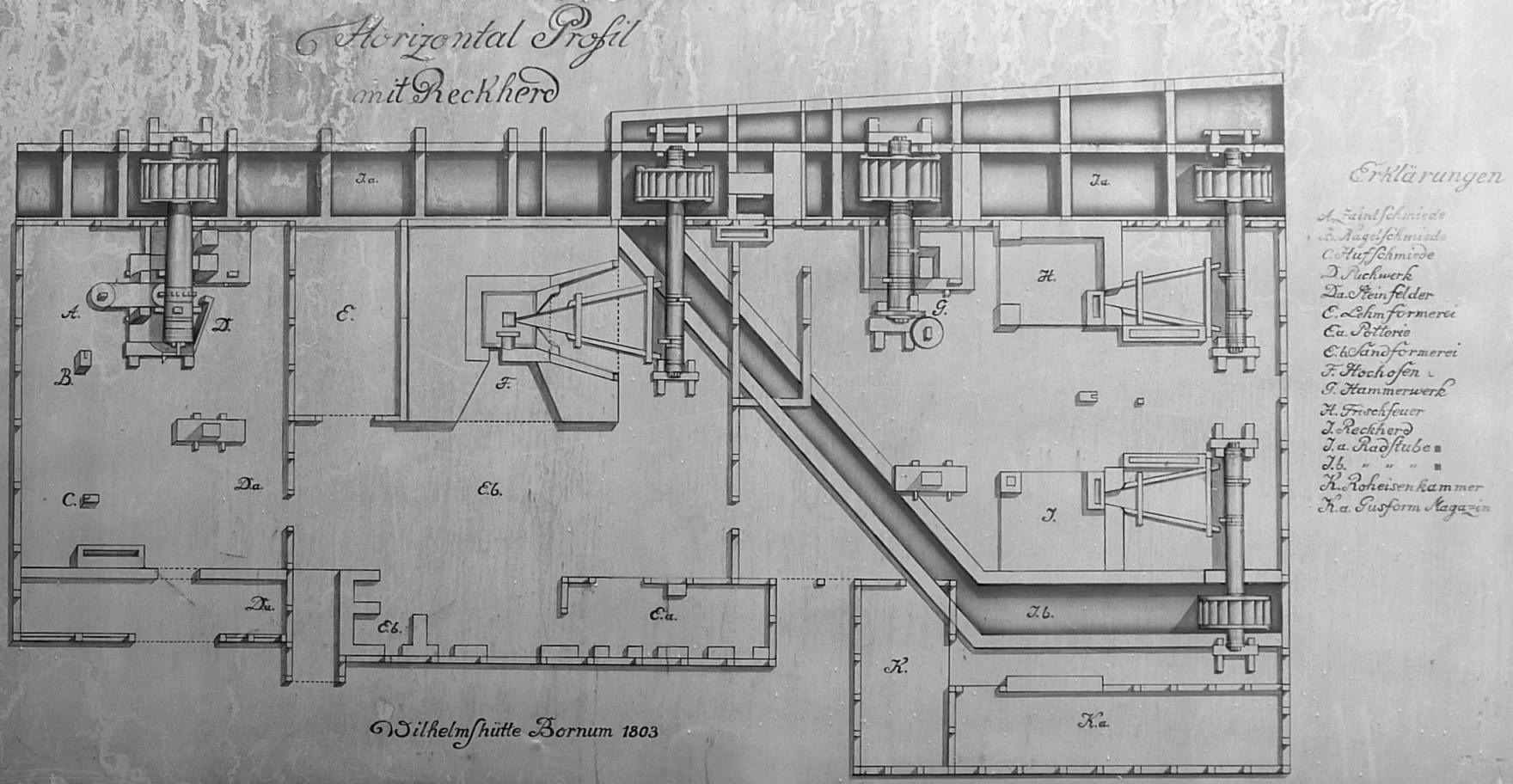 Plan der Wilhelmshütte Bornum